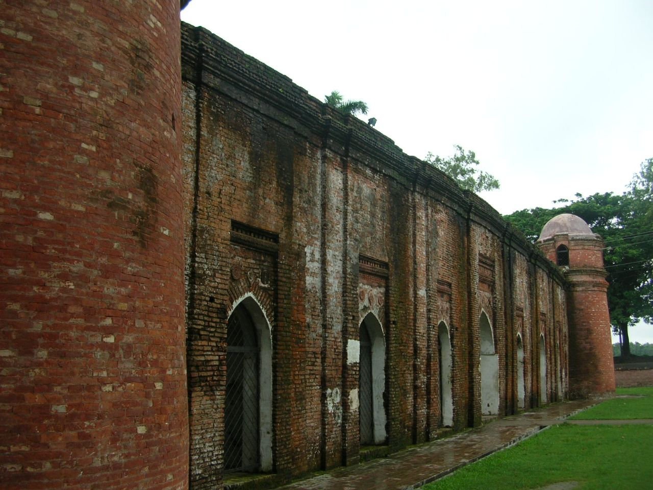 Shat Gambuj Mosque at Bagerhat.